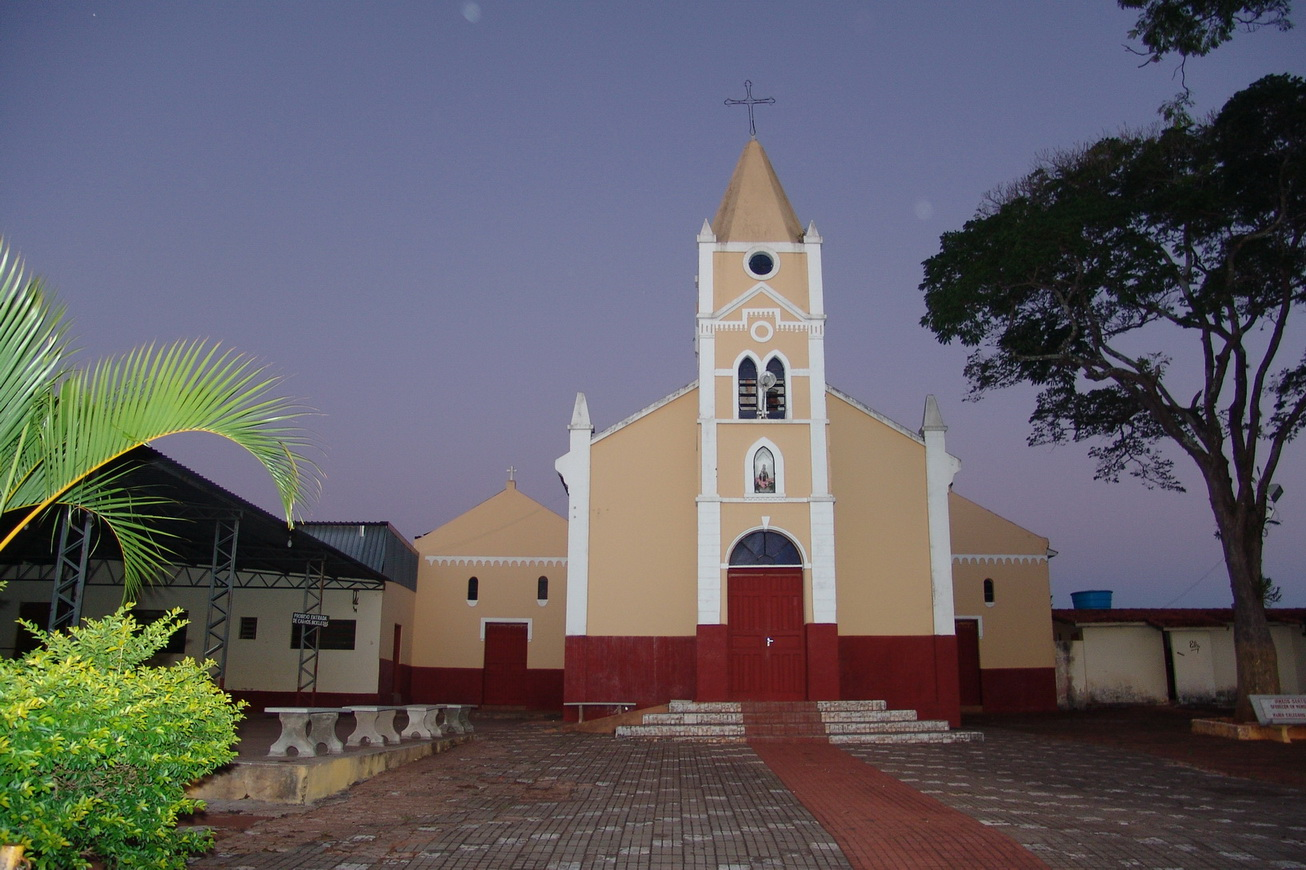 Vistas do município de Santa Cruz do Rio Pardo, estado de São Paulo, Brasil.